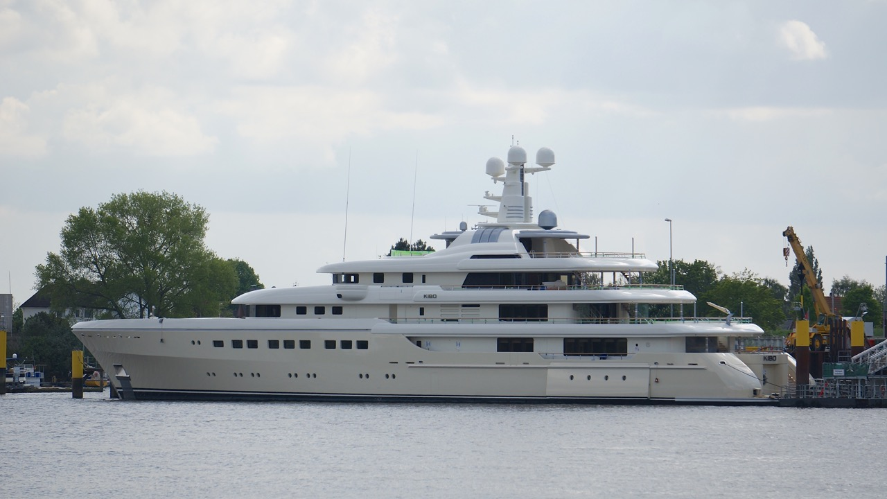 Motoryacht der Werft Abeking & Rasmussen